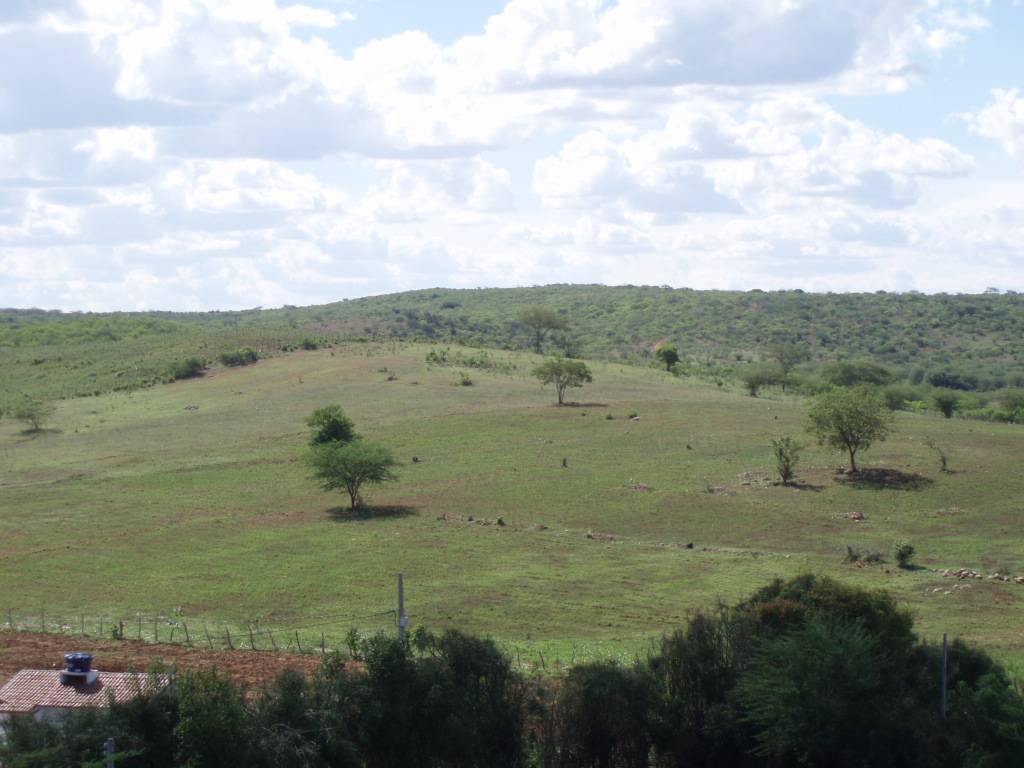 Chegada da cidade, bairro Malvinas